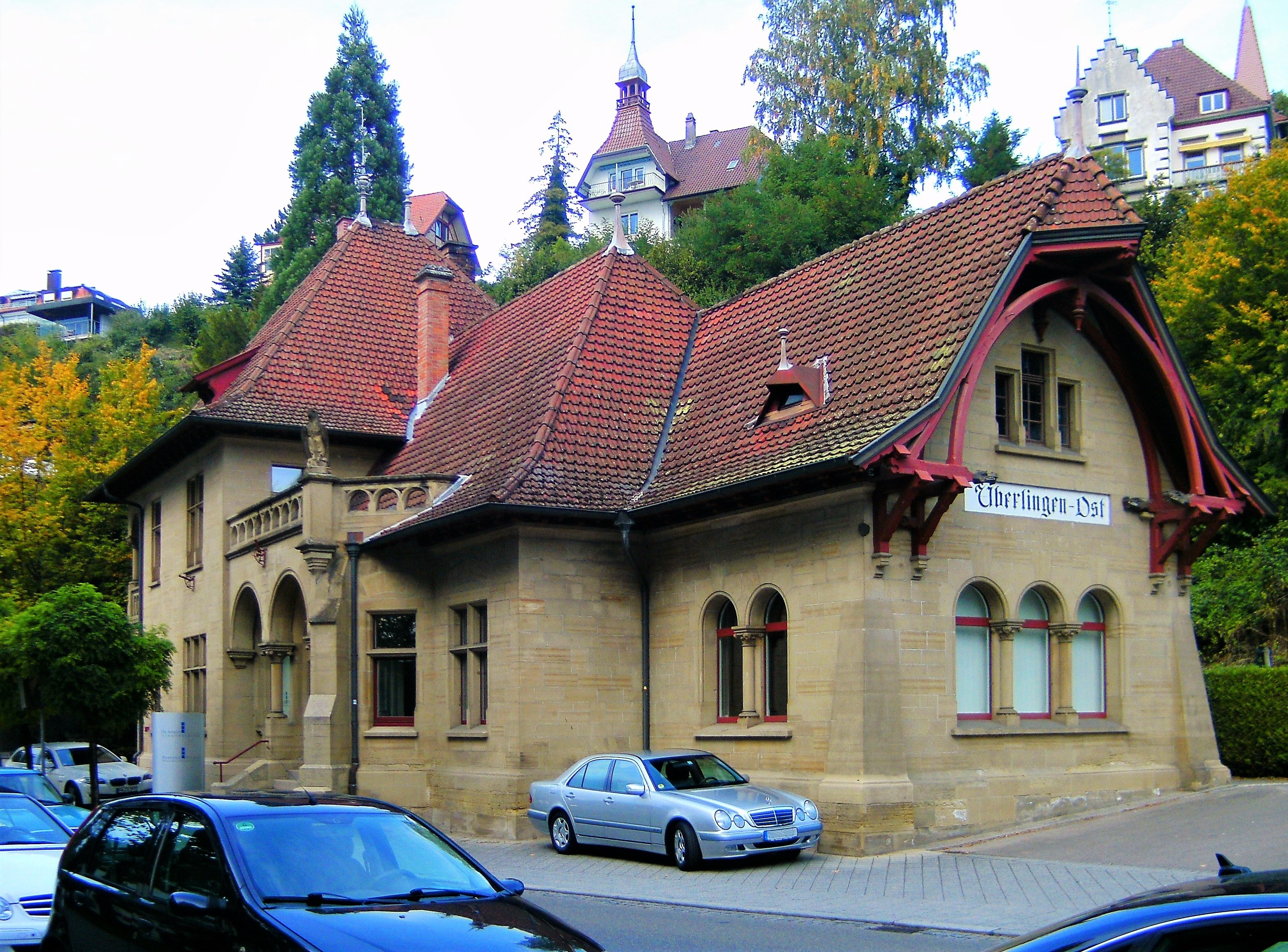 Ostbahnhof Überlingen